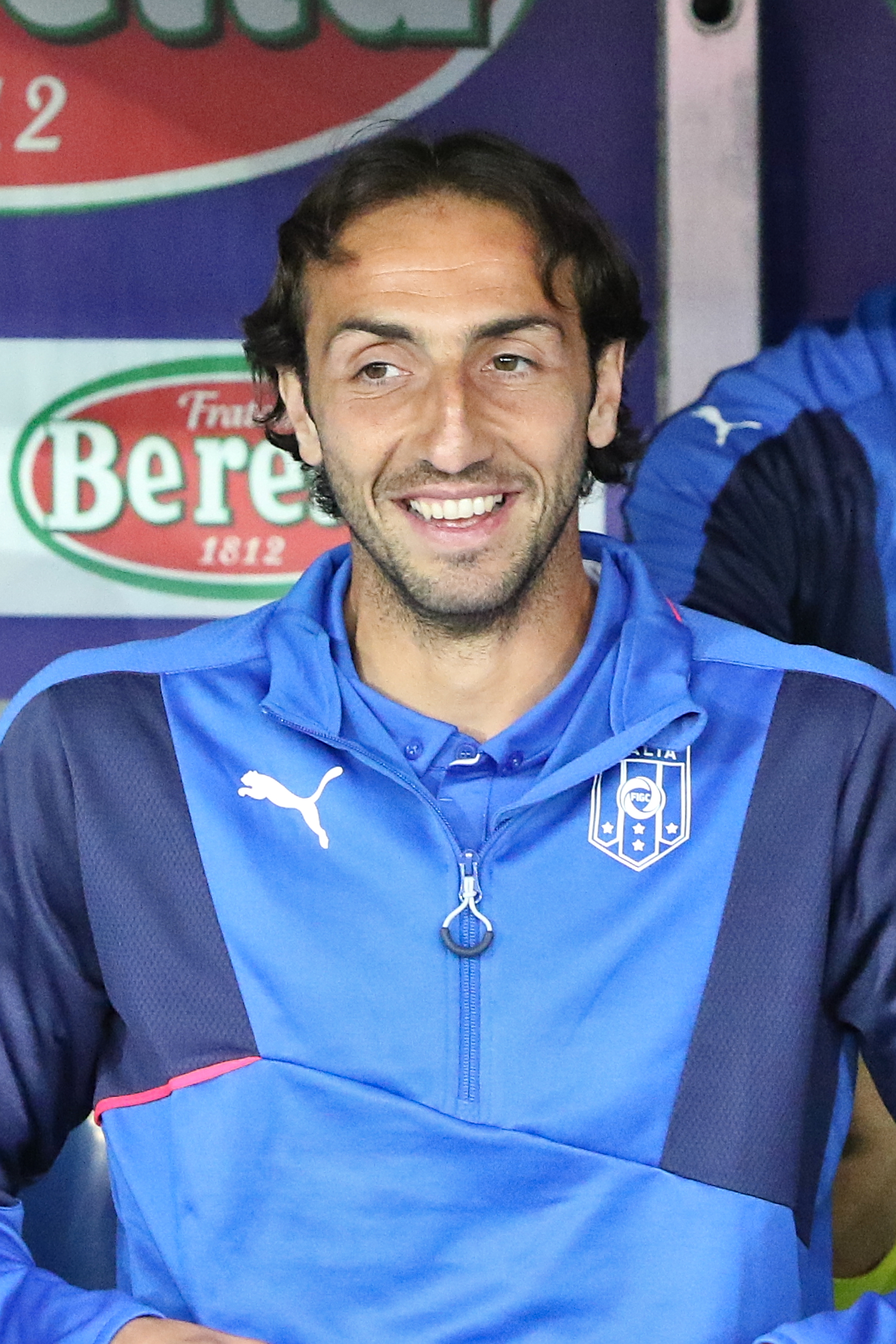 20150616 - Portugal - Italie - Genève - Emiliano Moretti